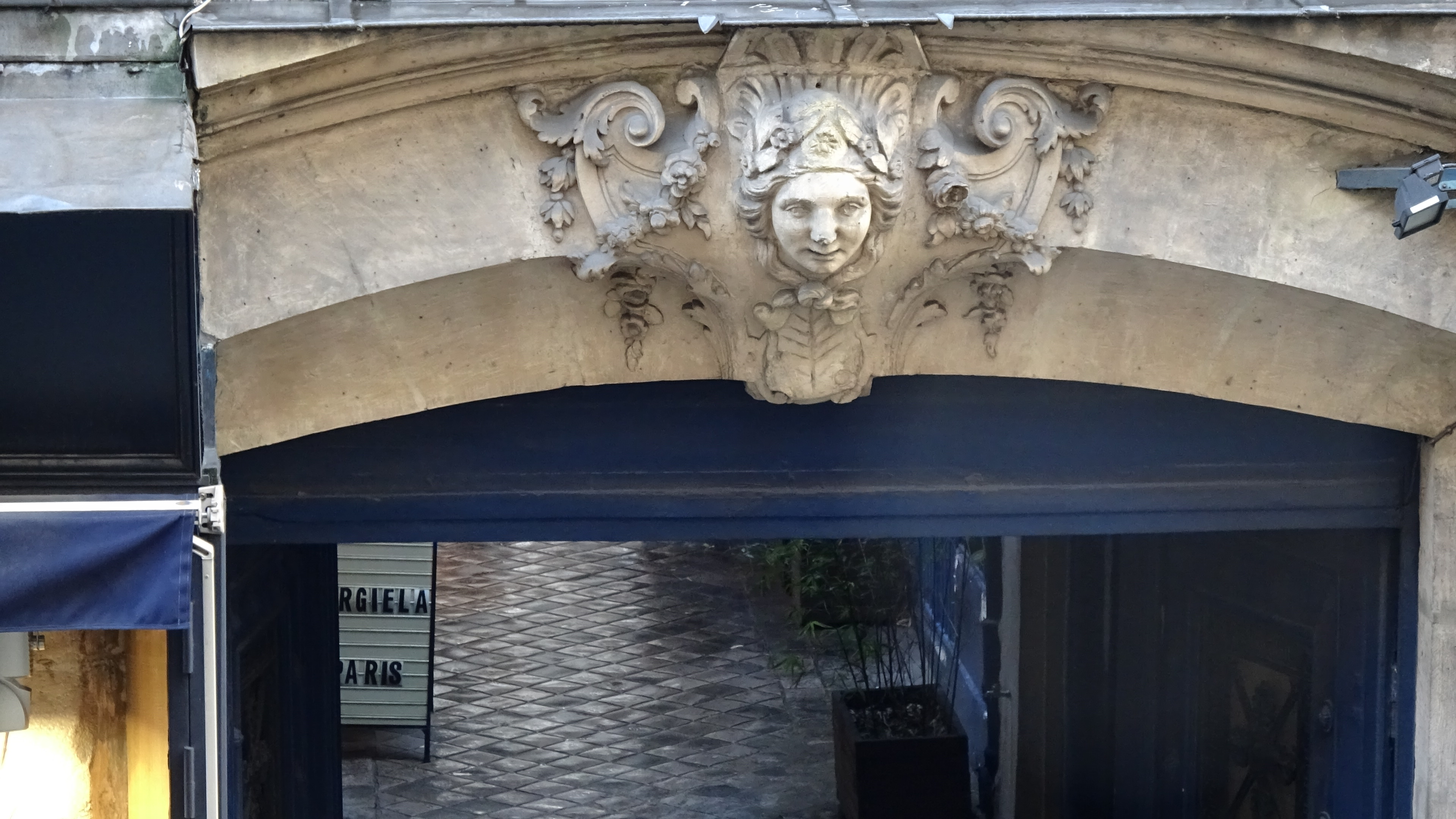 Sur le fronton du Porche du 26 rue de Richelieu, la tête sculptée d'Antoine de Beauvillers